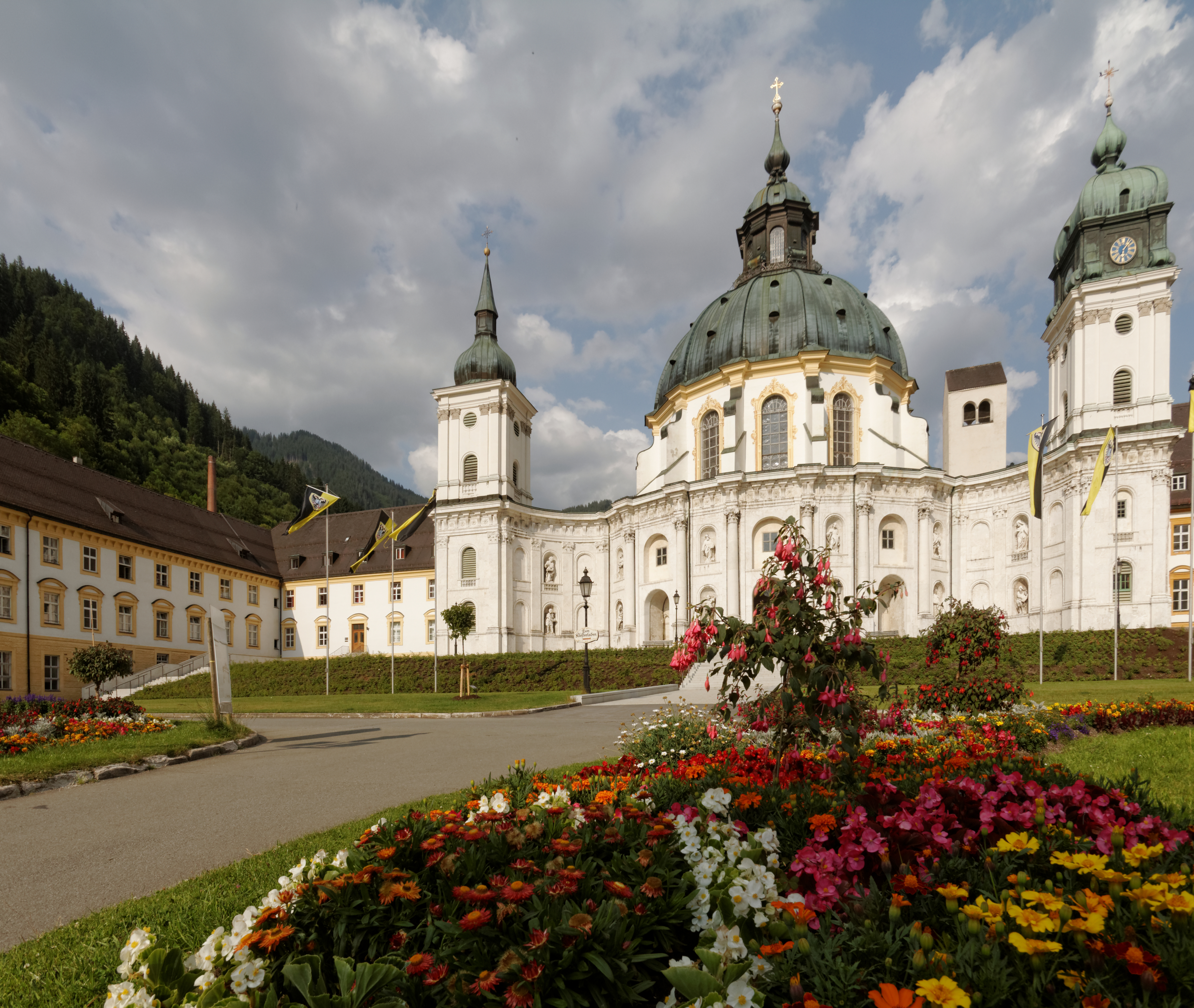 Kloster Ettal, Innenhof